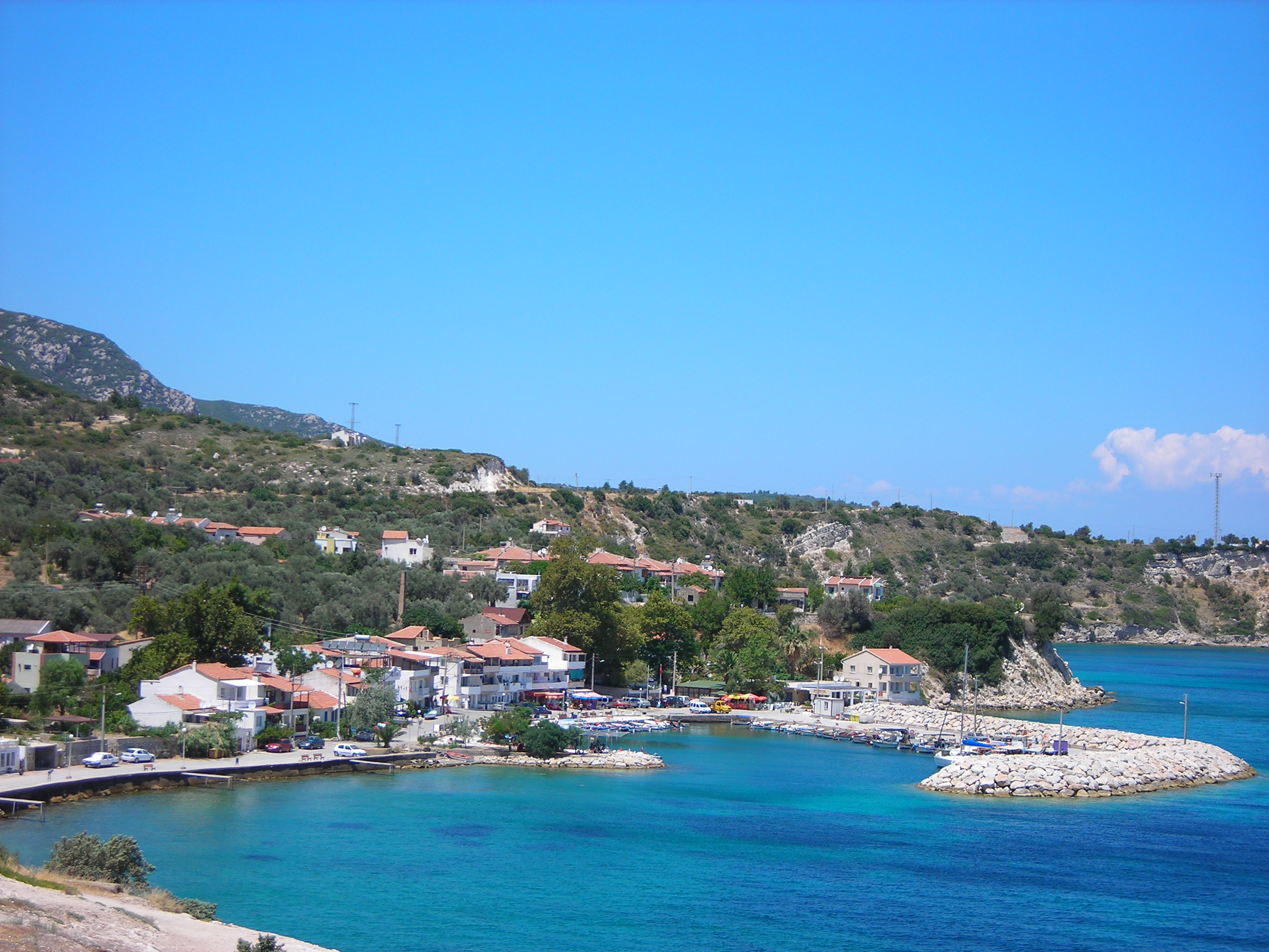 Kaynarpınar